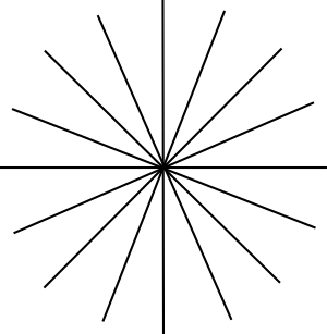 Тестовая мира для выявления астигматизма. Изображение нарисовано для иллюстрации статьи про астигматизм в офтальмологии.